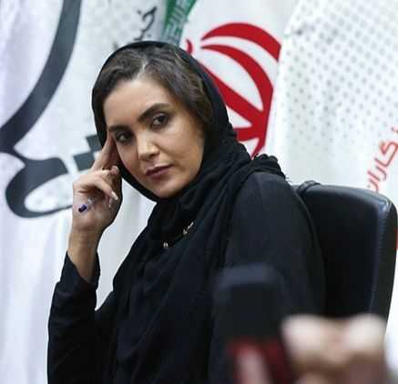 سامیه لک - شهریور ۱۳۹۸